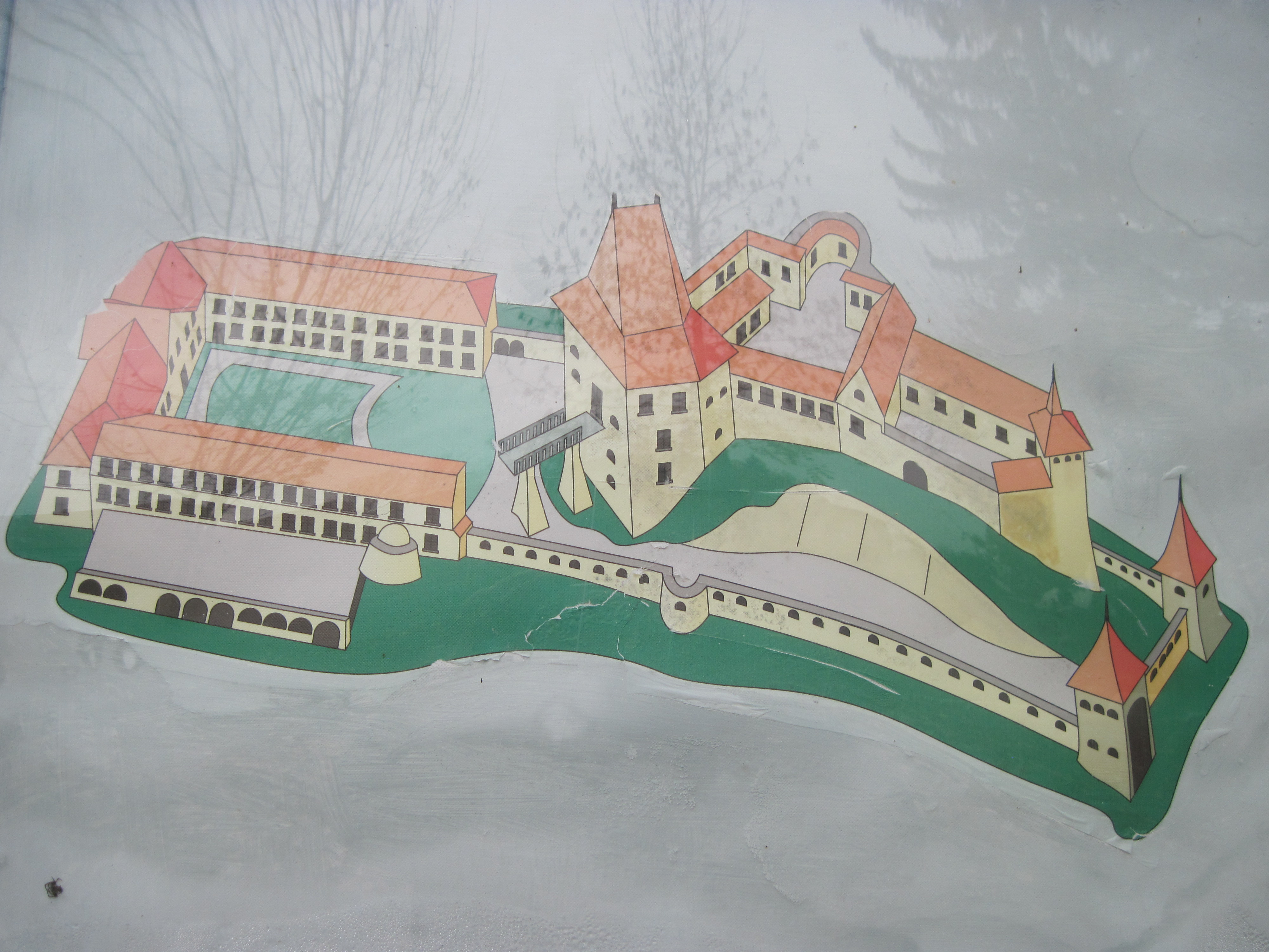 Макет замку Язловця, Замки Тернопілля